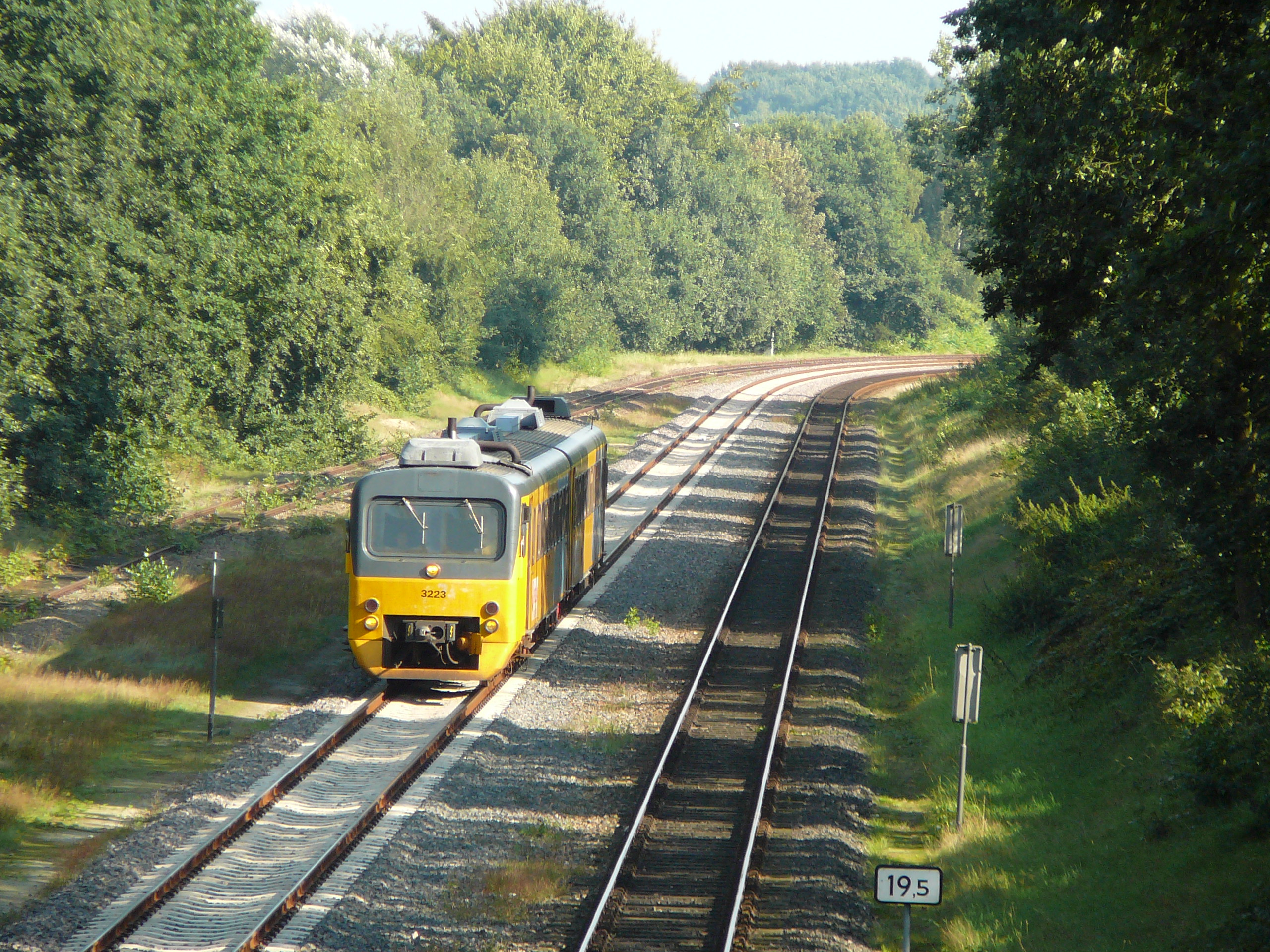 3223 Roermond - Nijmegen, Nijmegen Heijendaal